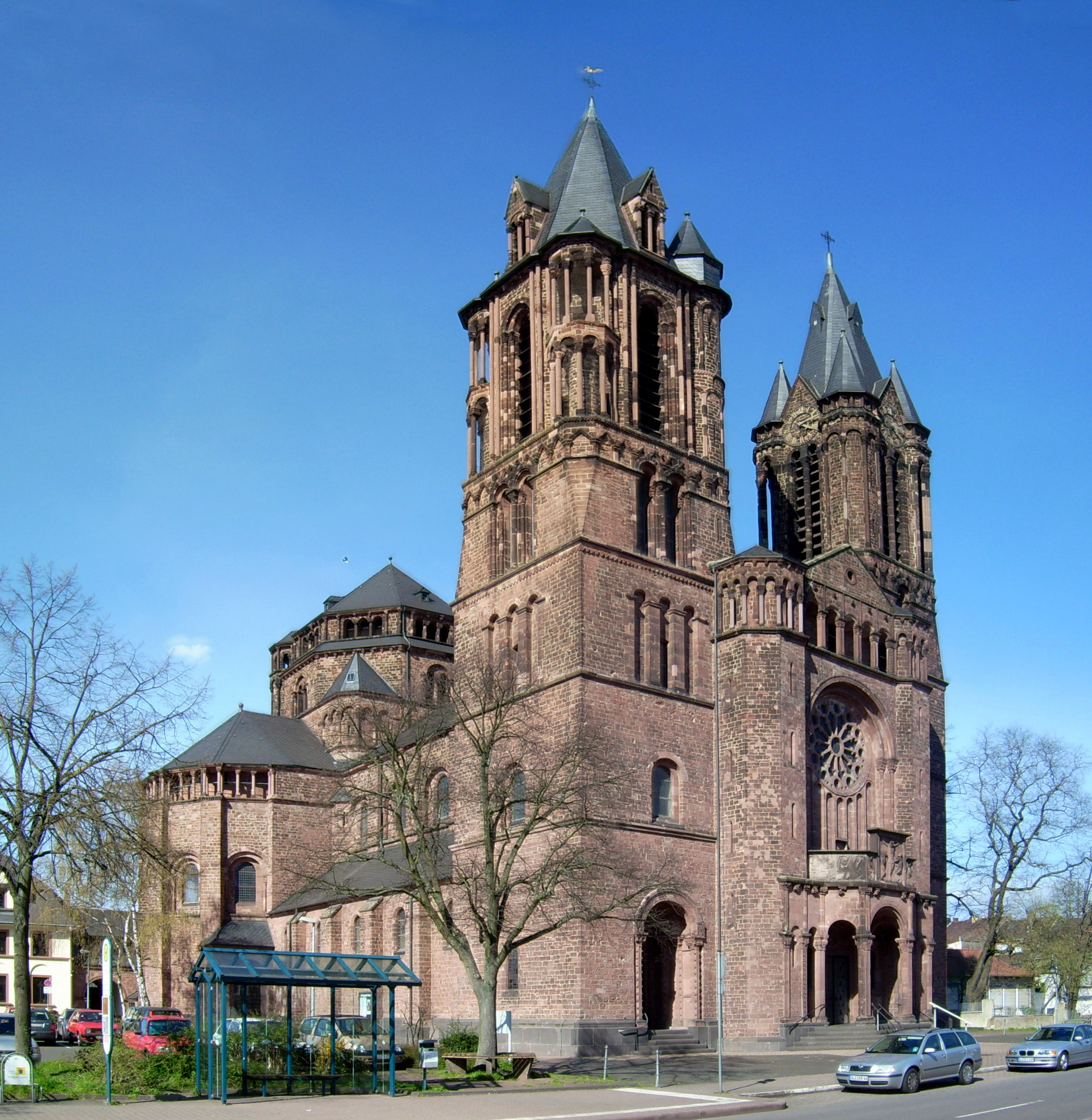 Saardom innen Panorama